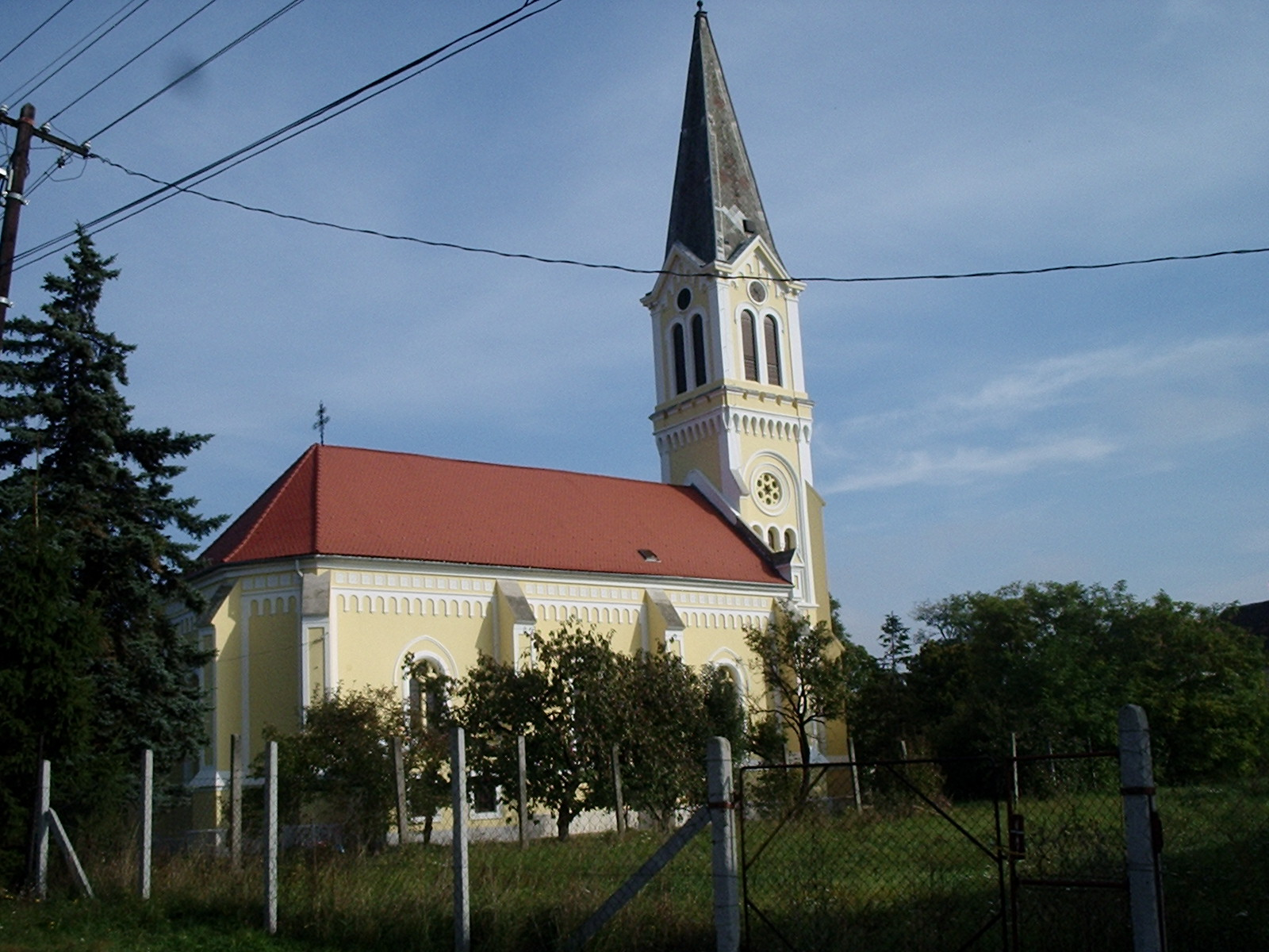 Harka, templom